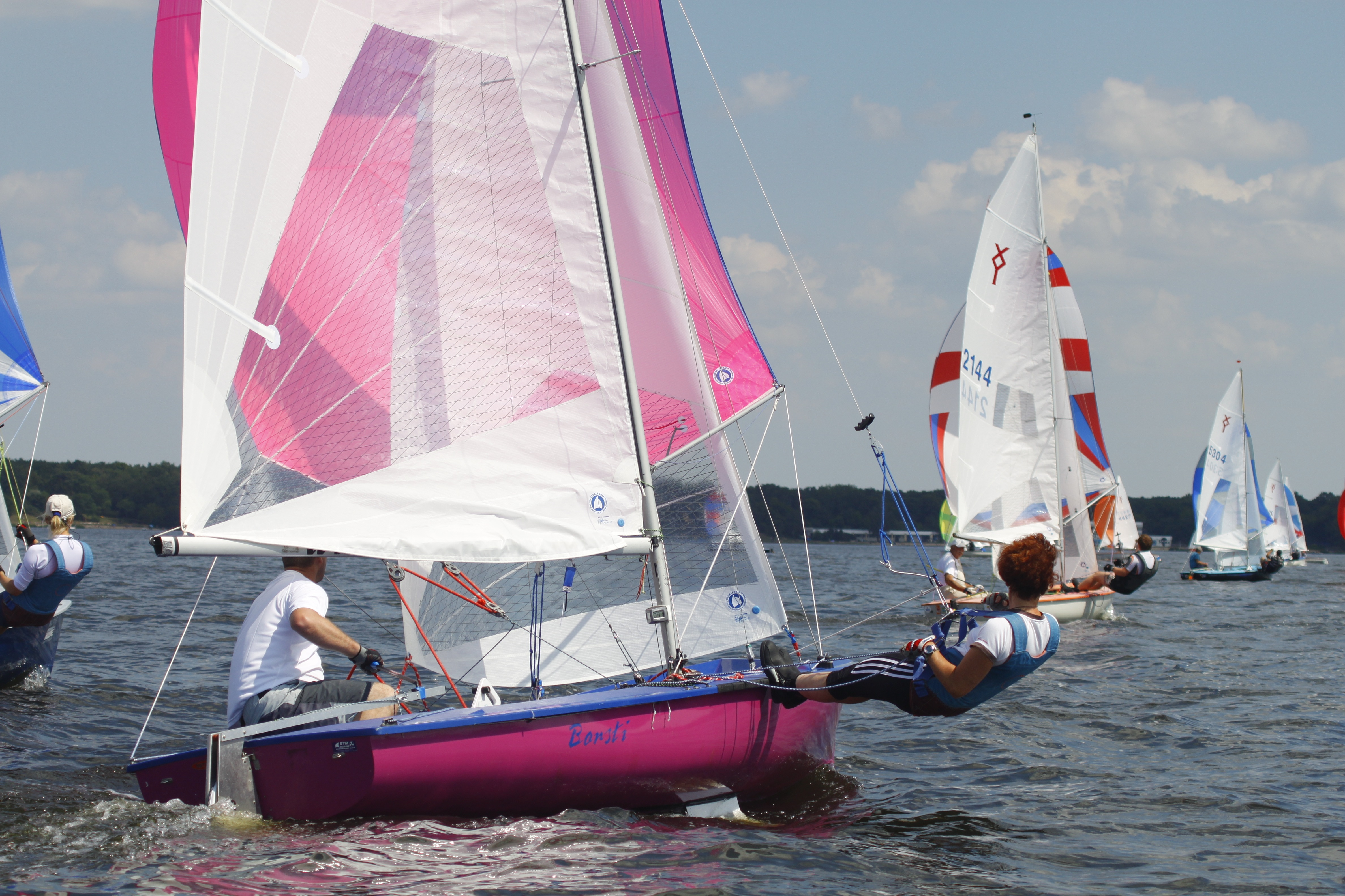 Ixylon deutsche Meisterschaft 2010